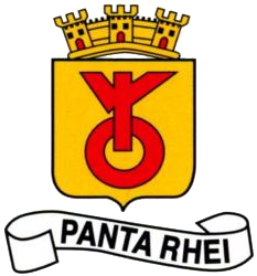 blason de la commune de Ronchamp, version + colorée